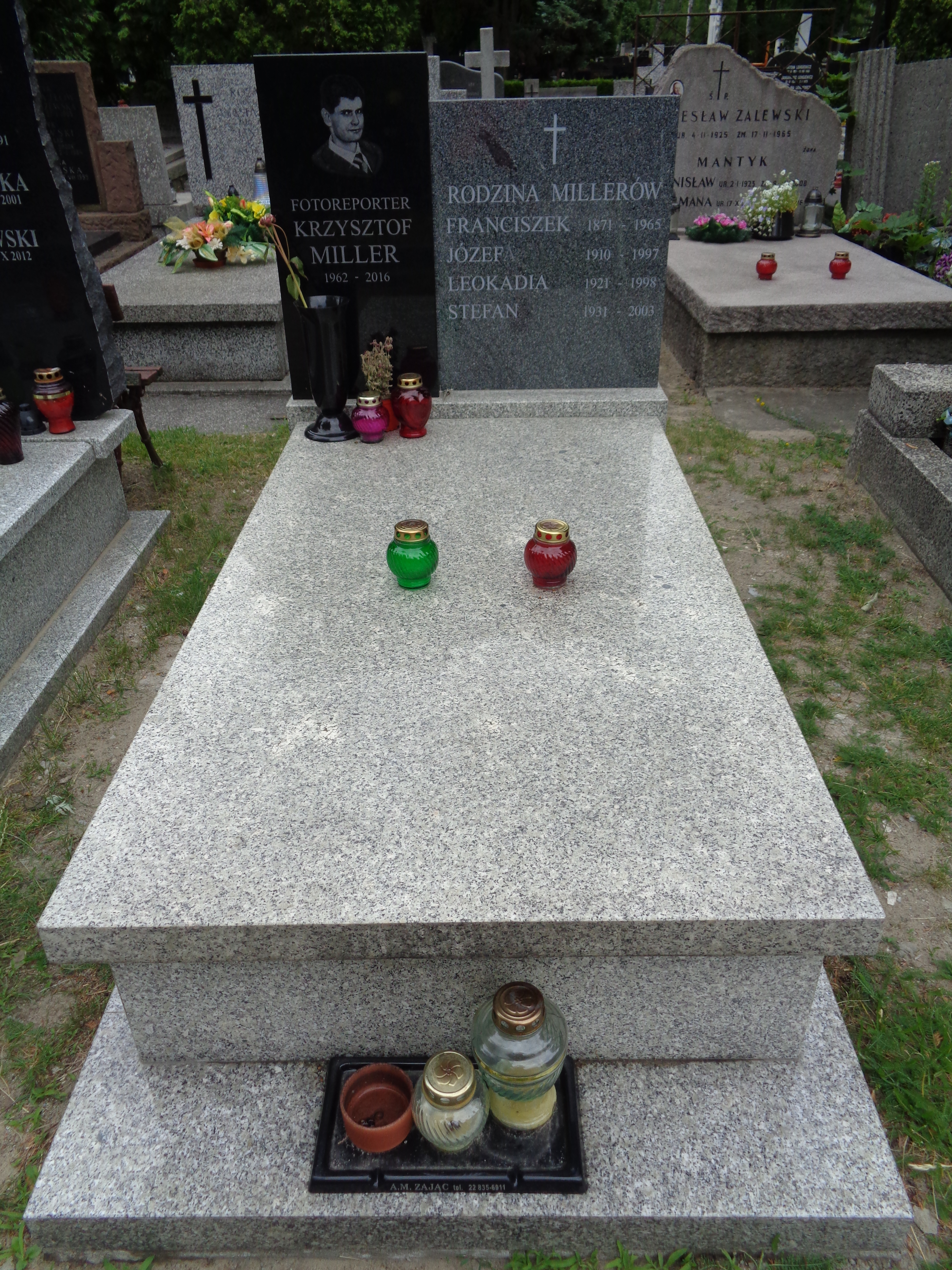 Grób na wojskowych powązkach